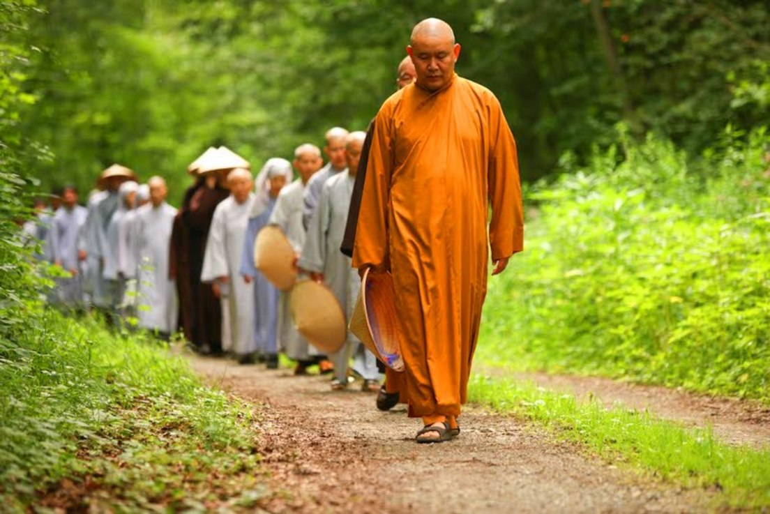 Преподобный Тхить Ньы Дьен